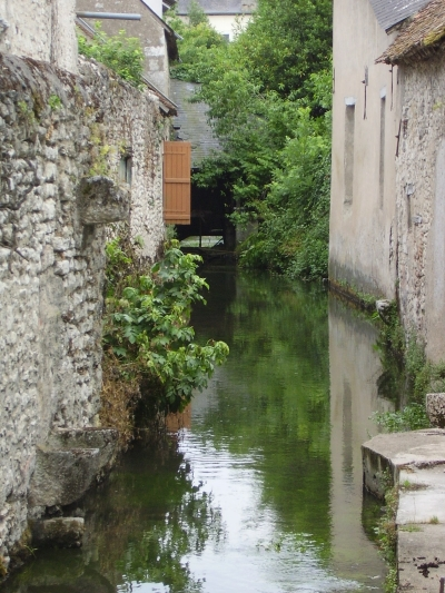 Meung-sur-Loire RPLl - juin 2006